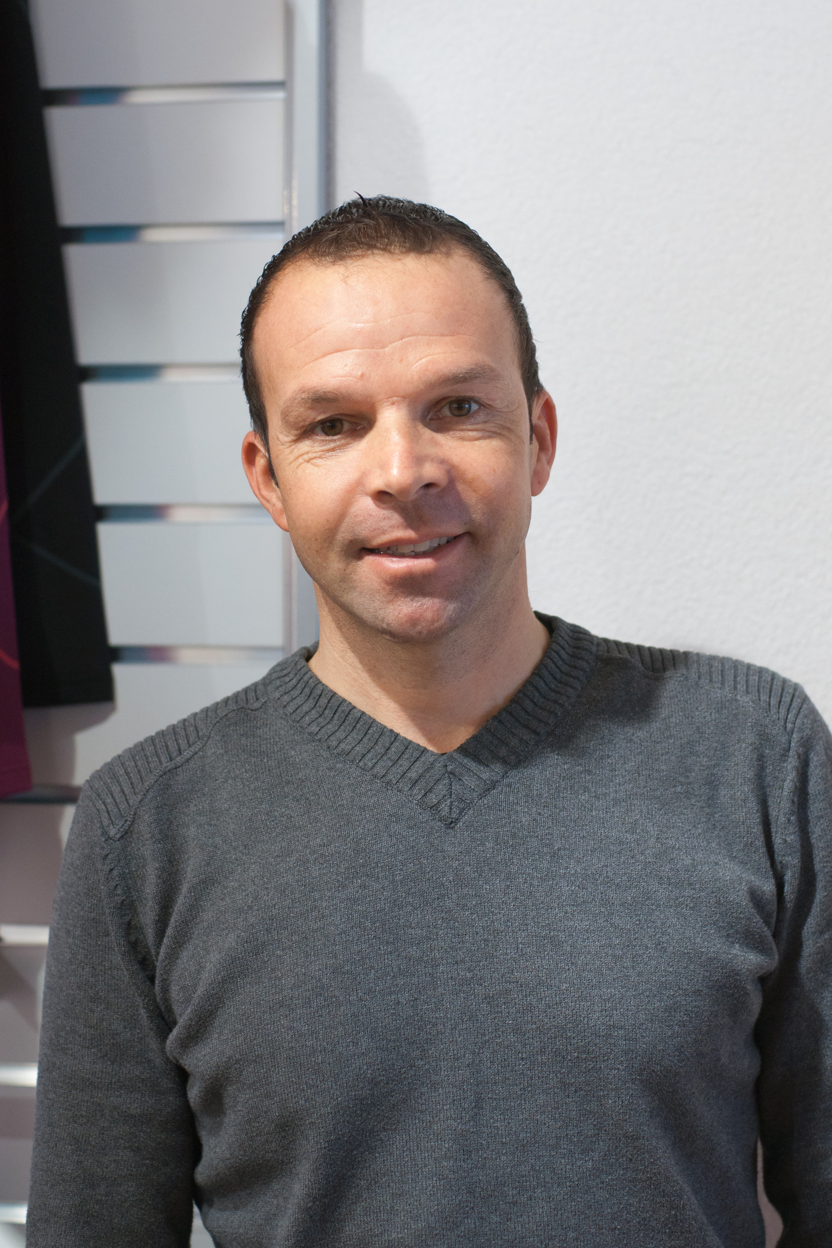 Laurent Dufaux en février 2014 à Aigle, Suisse.